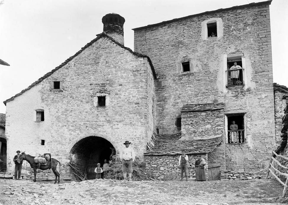 Imatge